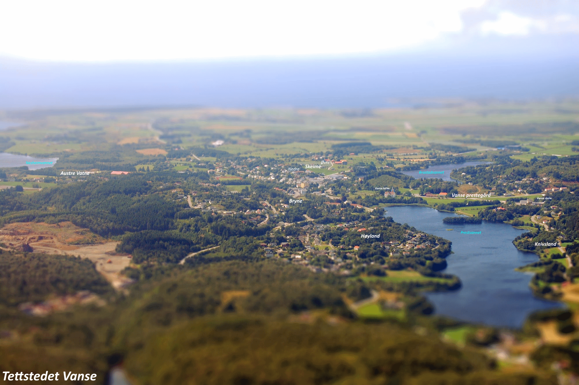 Flyfoto av tettstedet Vanse. Med navn på områder. Effekt: Tilt-shift